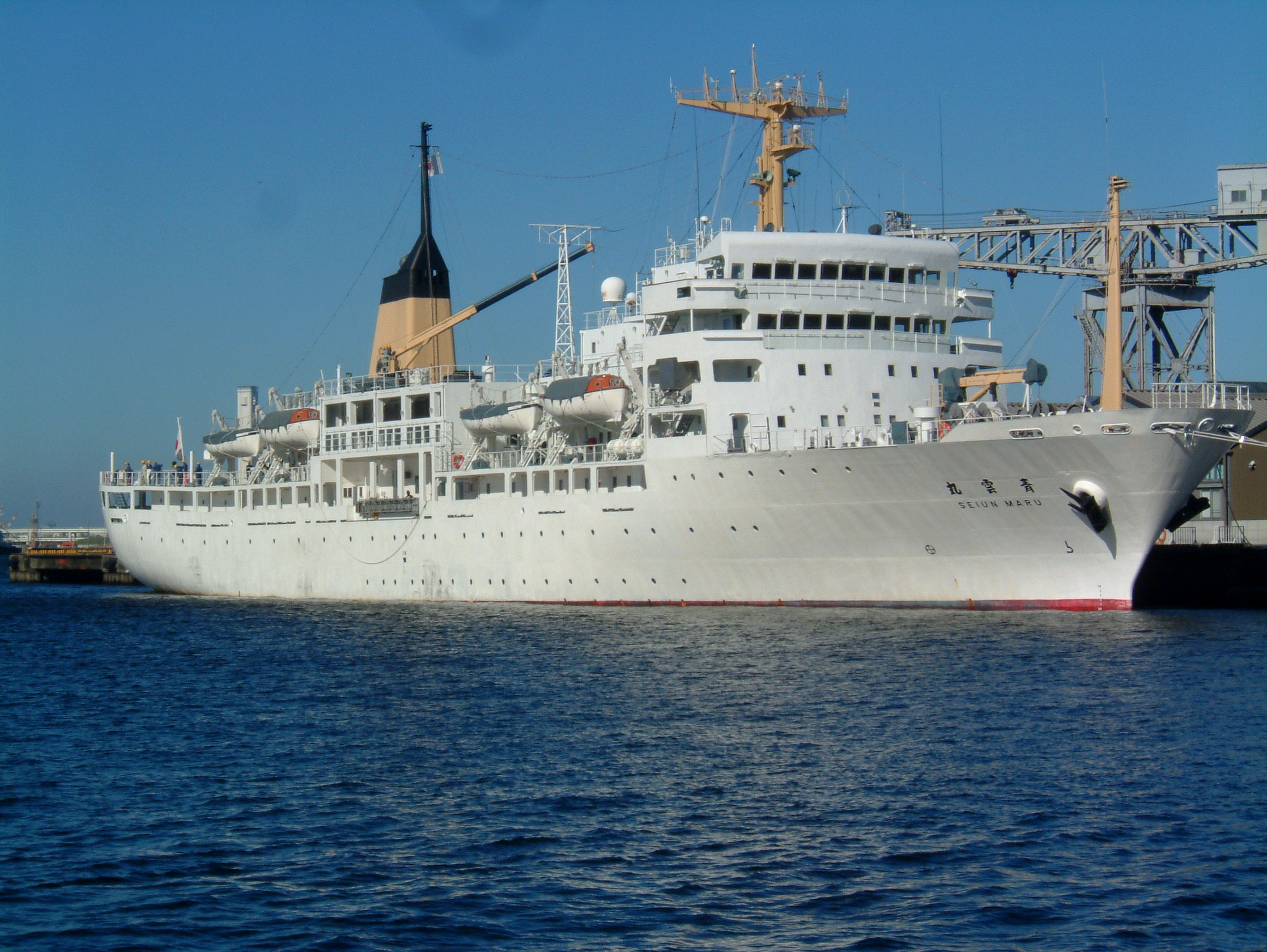 航海訓練所の練習船青雲丸（せいうんまる）、横浜市中区の新港ふ頭で撮影